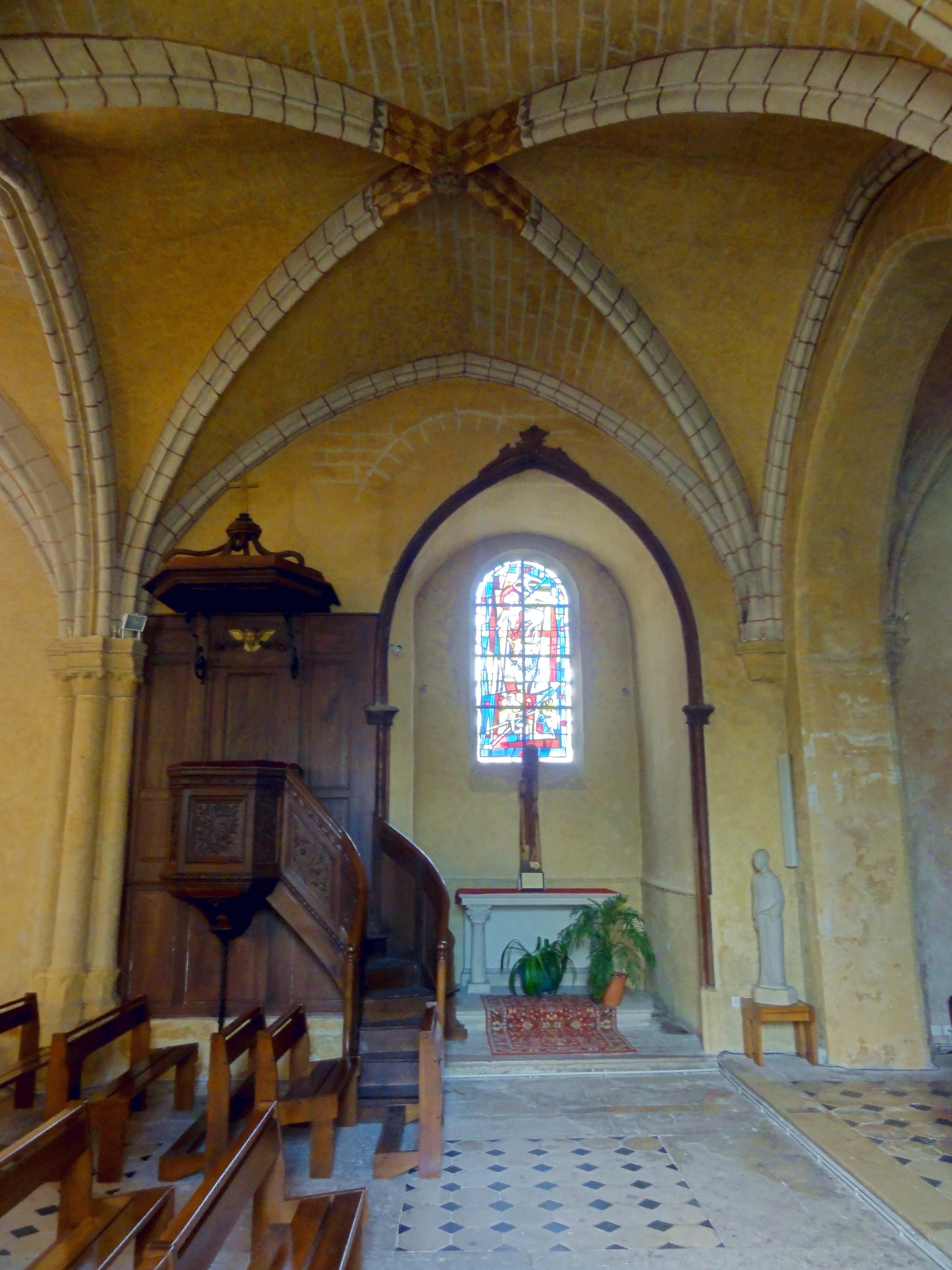 Intérieur de l'église - voir titre.